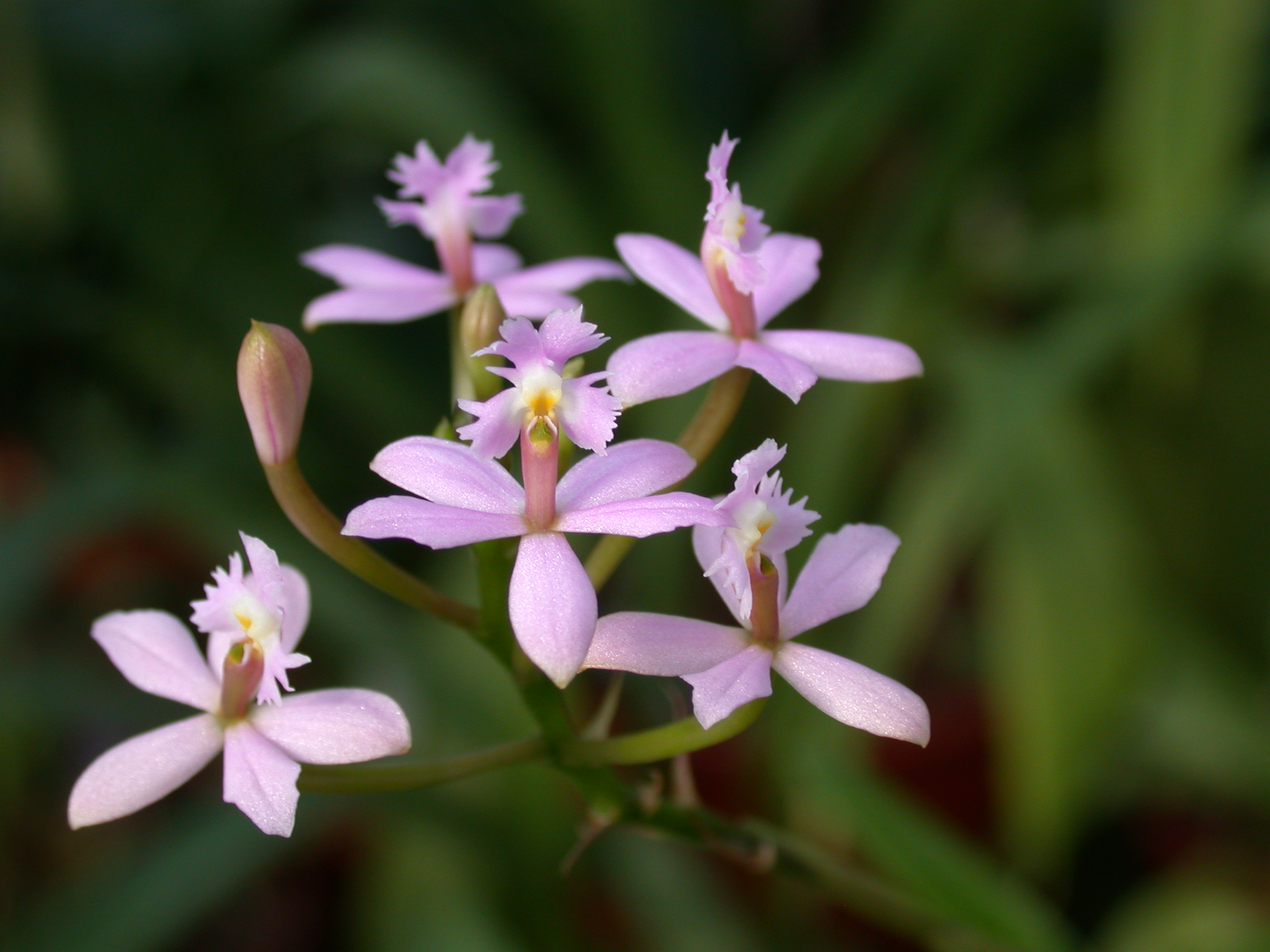 Epidendrum ibaguense